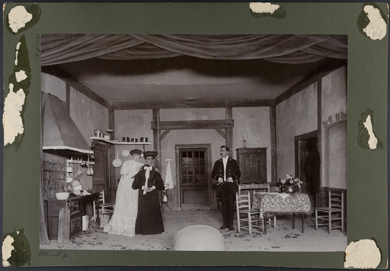 Scenbild från uppsättning av August Strindbergs pjäs Fröken Julie.